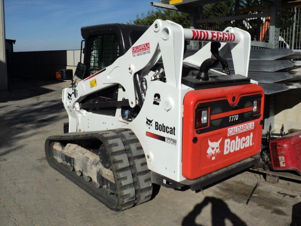 Bobcat T770 H SJC, con cabina chiusa, aria condizionata, Comandi SJC, Alta portata idraulica e Seconda velocità